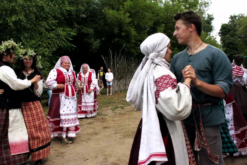 Беларуская (тарашкевіца): Зялёныя Сьвяткі Магілёў 29.06.2913